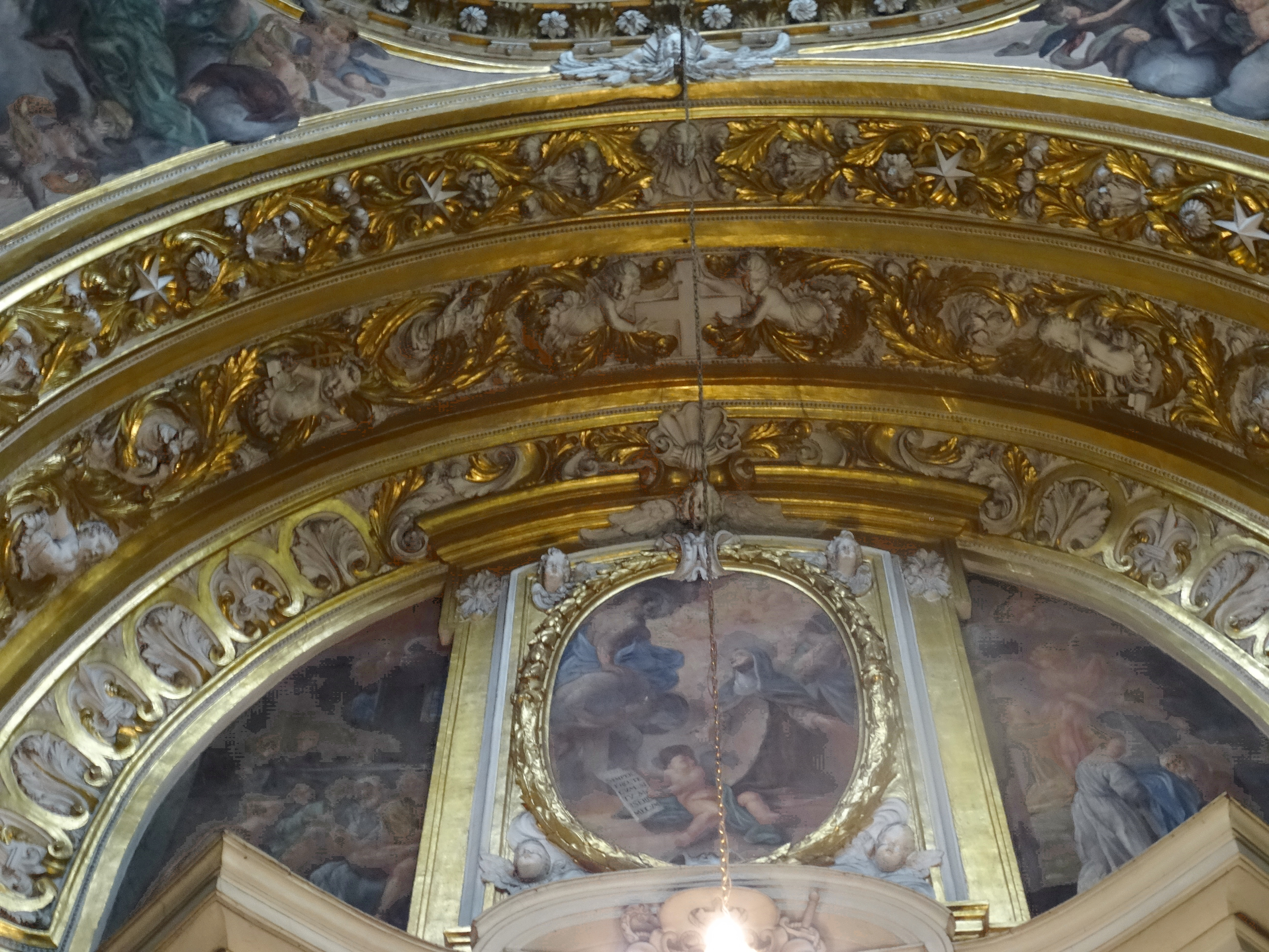 Breslauer Dom Deckendetail